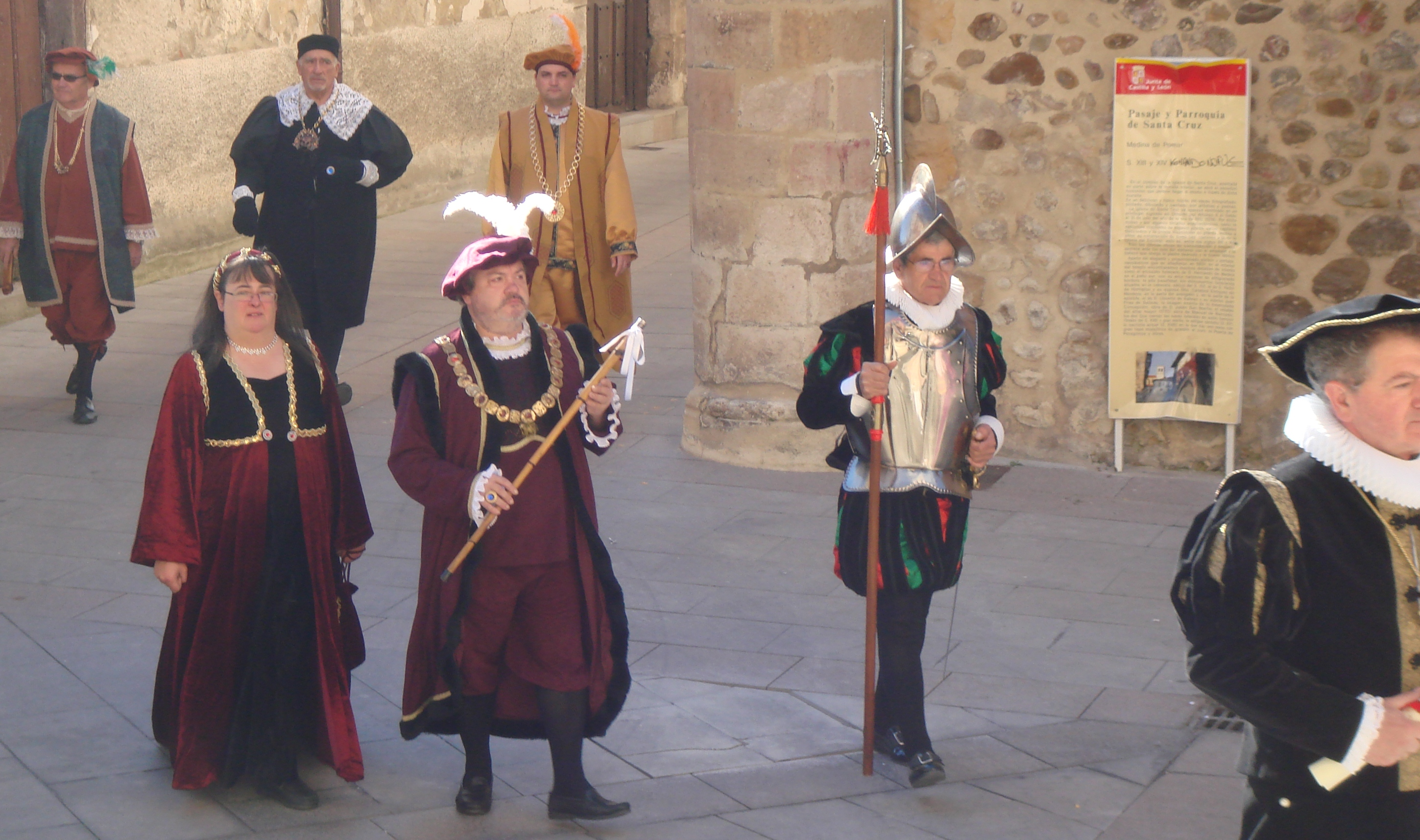 Llegada del Condestable, Medina de Pomar 2007, Ruta Carlos V